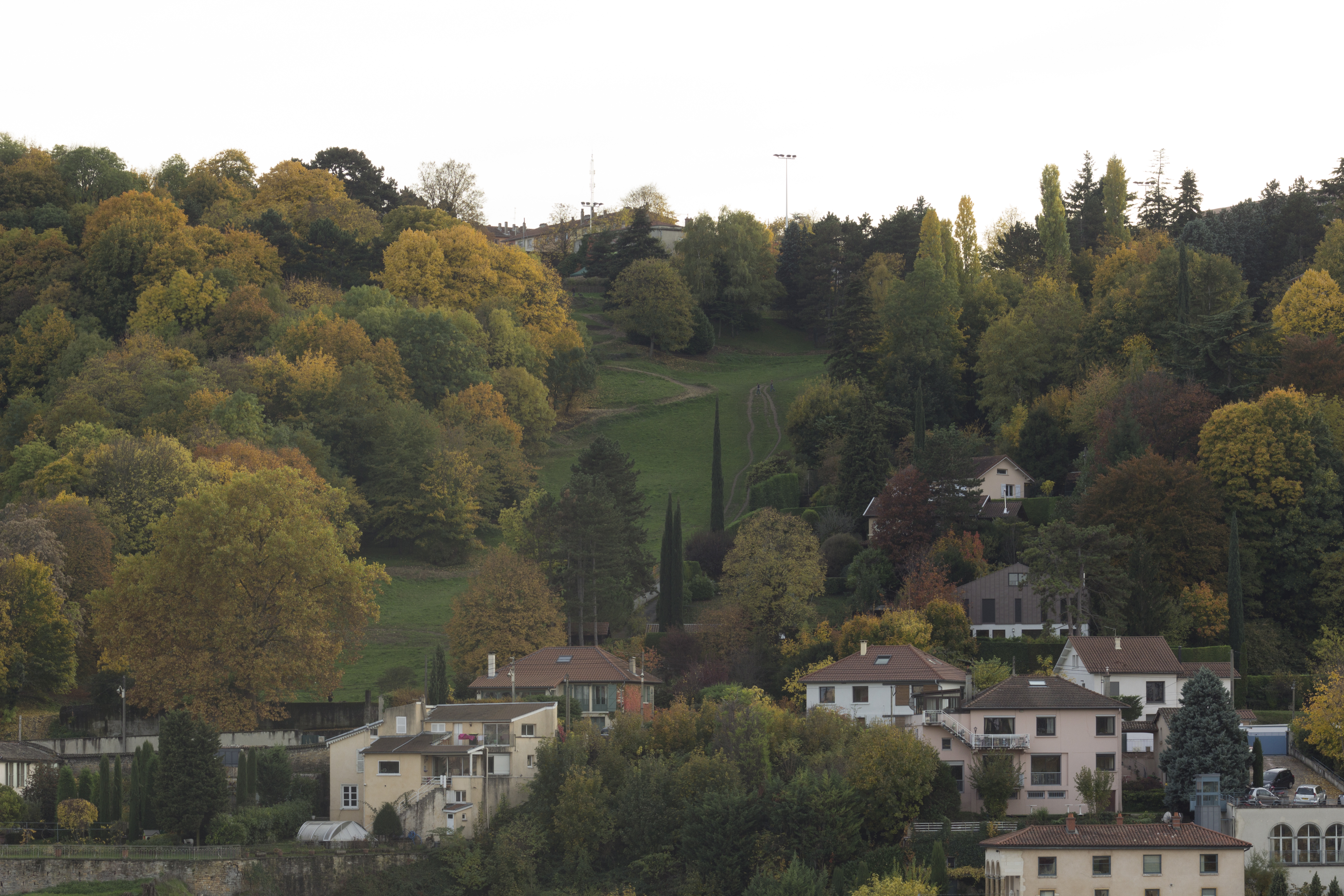 Piste de la Sarra en automne à Lyon.